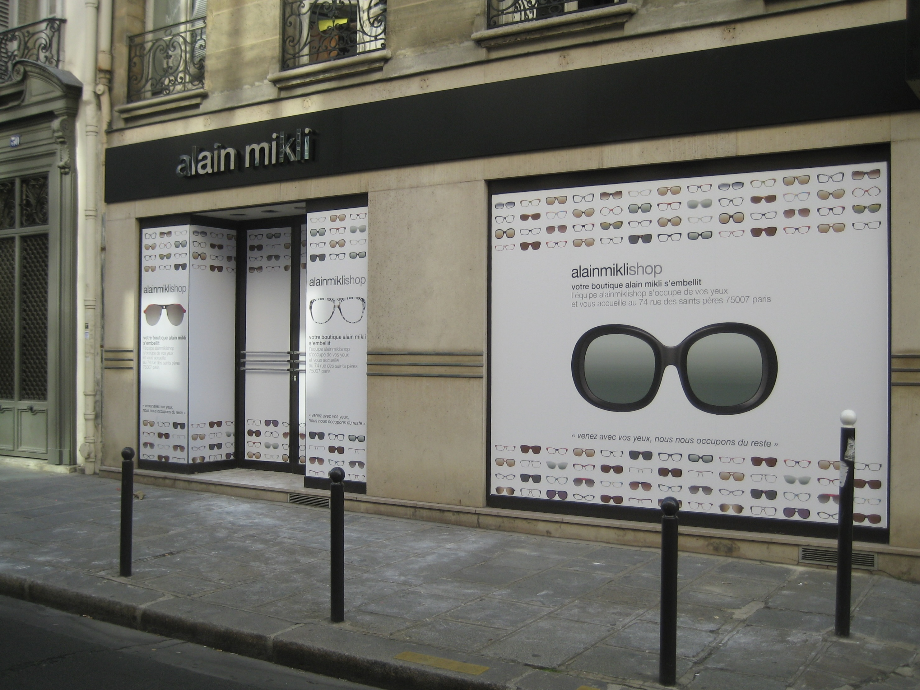 boutique alain mikli à Paris